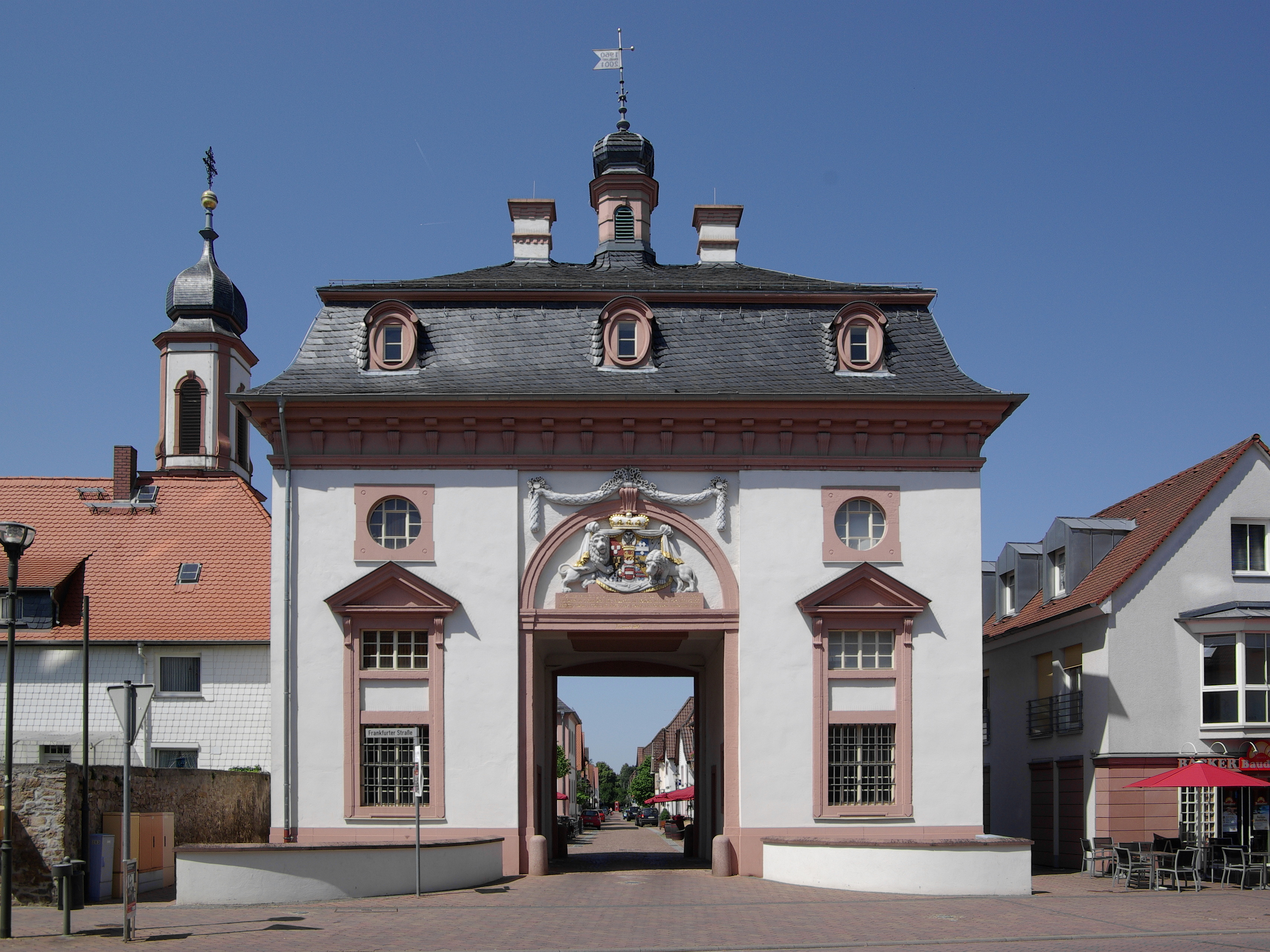 Heusenstamm, Torbau